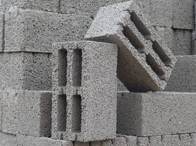 Основным наполнителем керамзитобетона служит 60% керамзита (легкий и пористый материал, полученный путем обжига глины) + 10% цемента и 30 % песка. Благодаря наличию керамзита в блоке, на выходе получается материал, с высокими теплозвукоизоляционными свойствами, чем-то даже схожим с кирпичом.